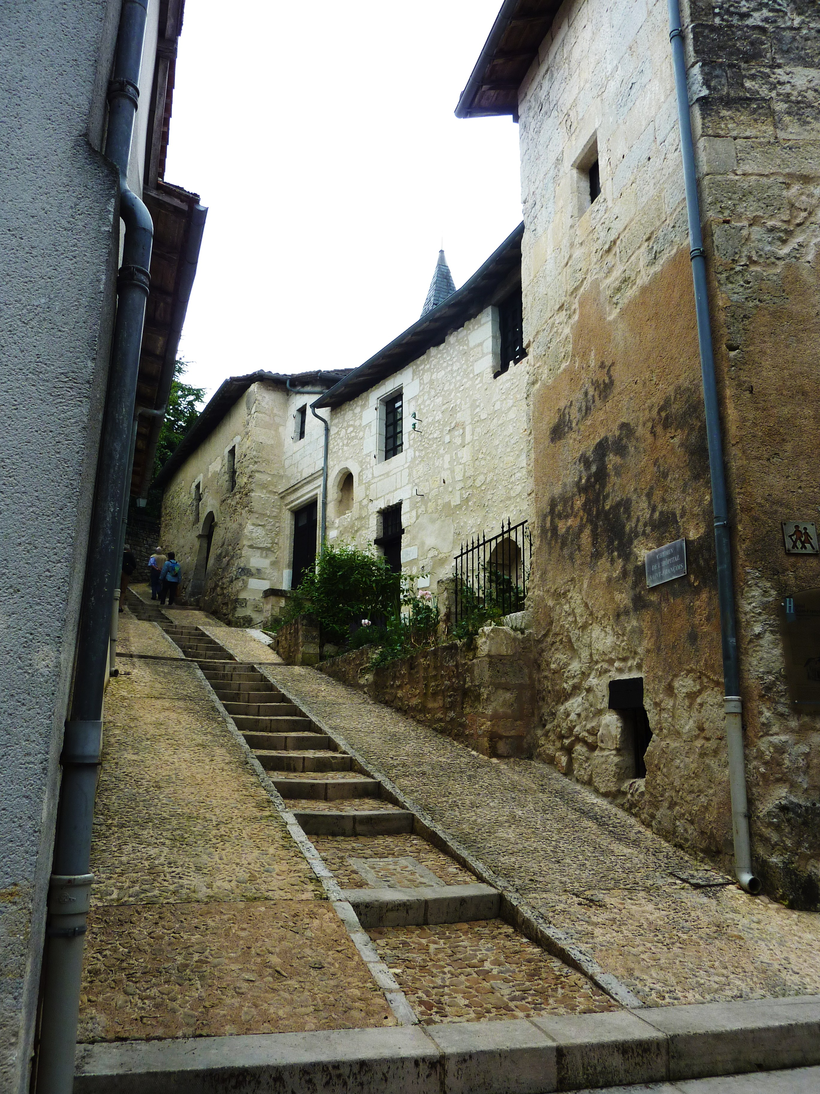 Aubeterre-sur-Dronne: l'ancien hospice